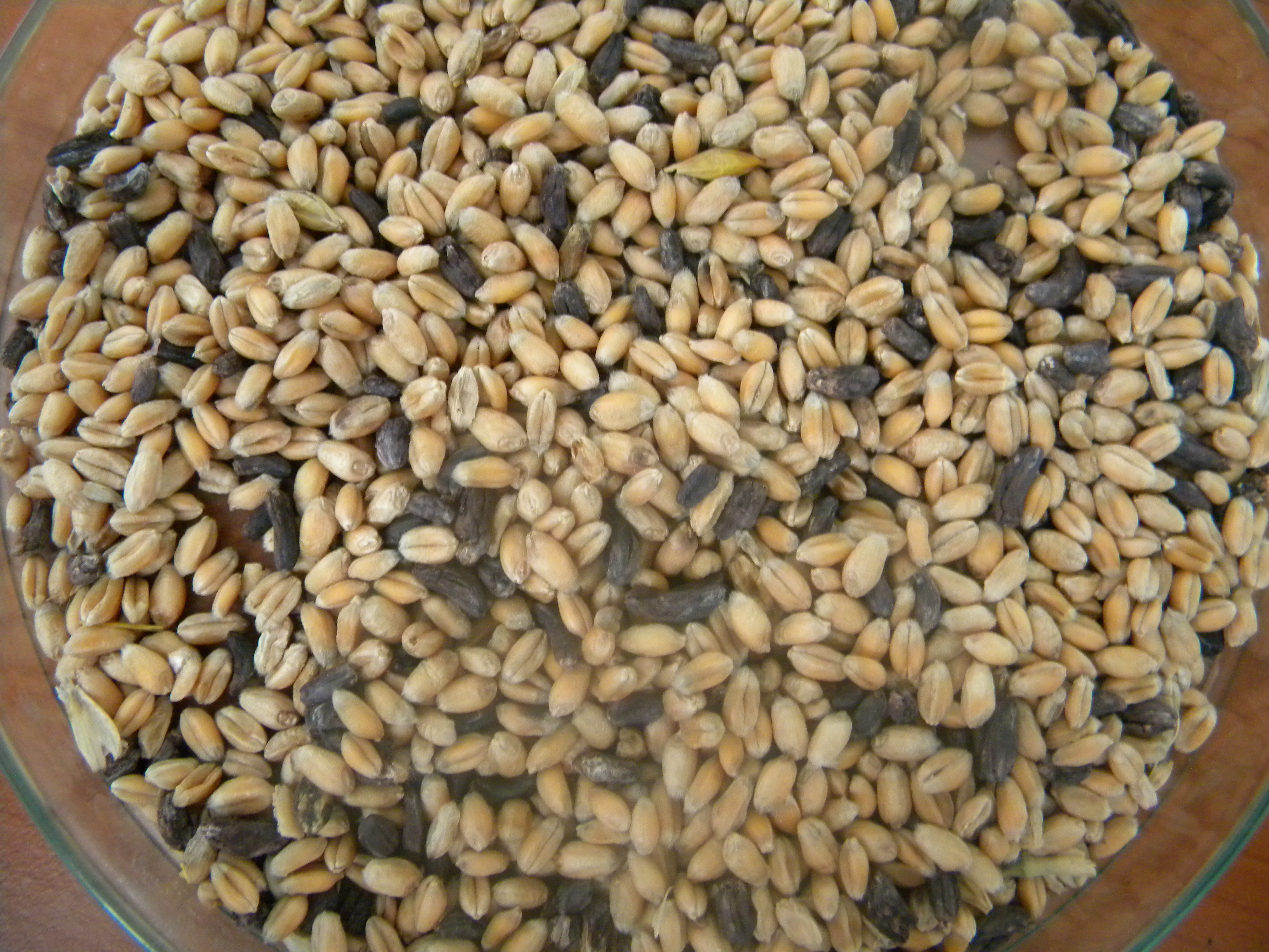 Triticum aestivum kun Claviceps purpurea (Vertilly)